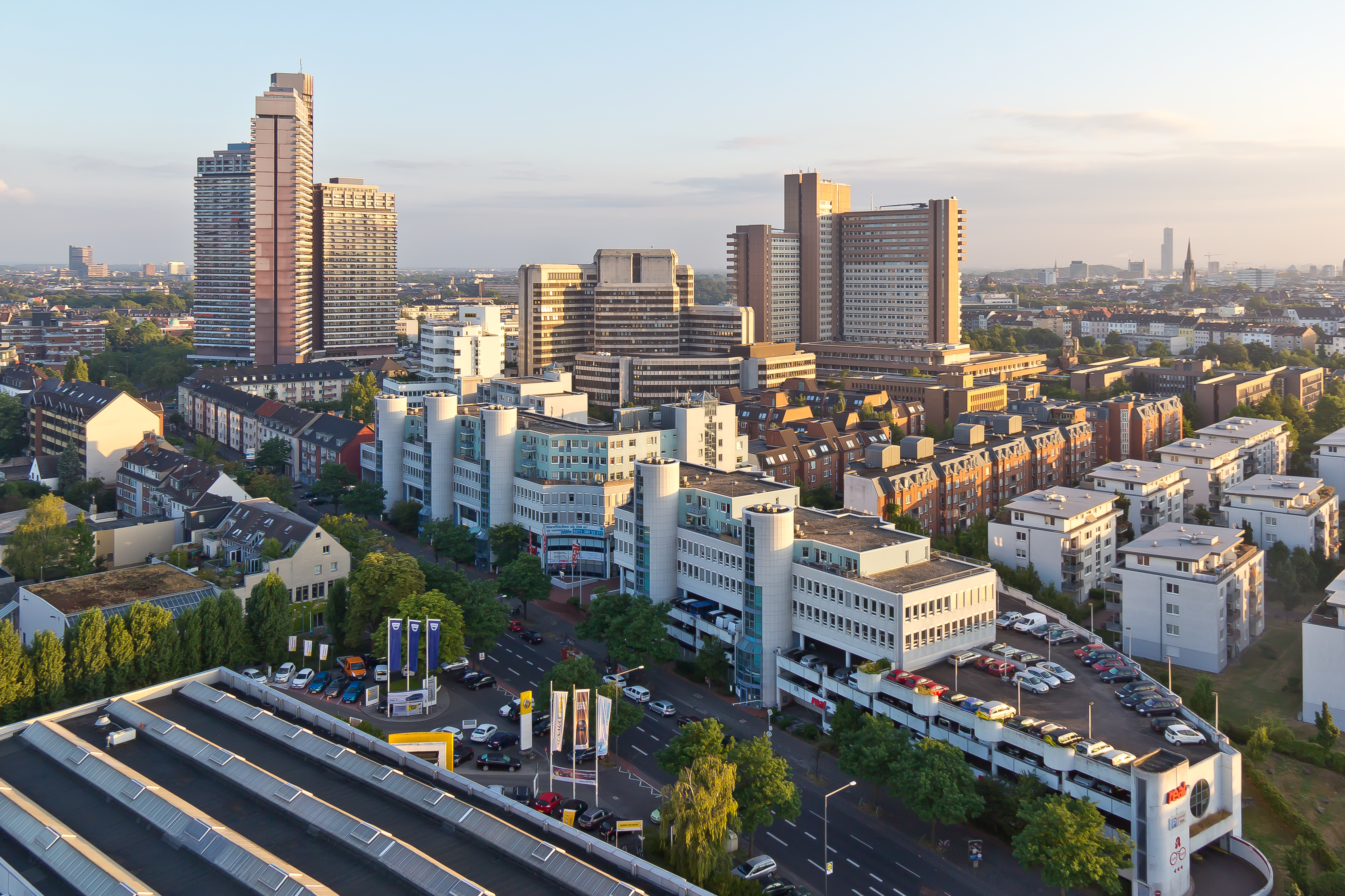 Ballonfahrt über Köln - Weißhausstraße, Uni-Center, Arbeitsamt, Justizzentrum